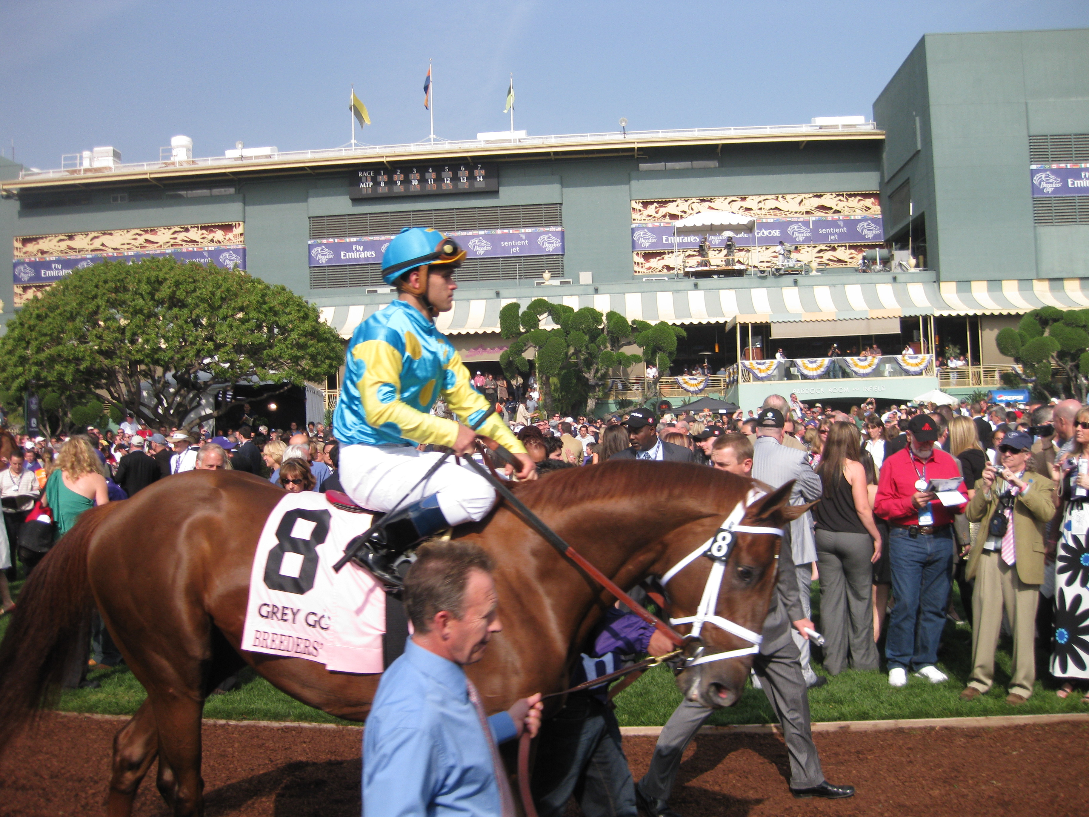 Eskendereya (Castellano, Javier) 2009 Breeders' Cup Juvenile